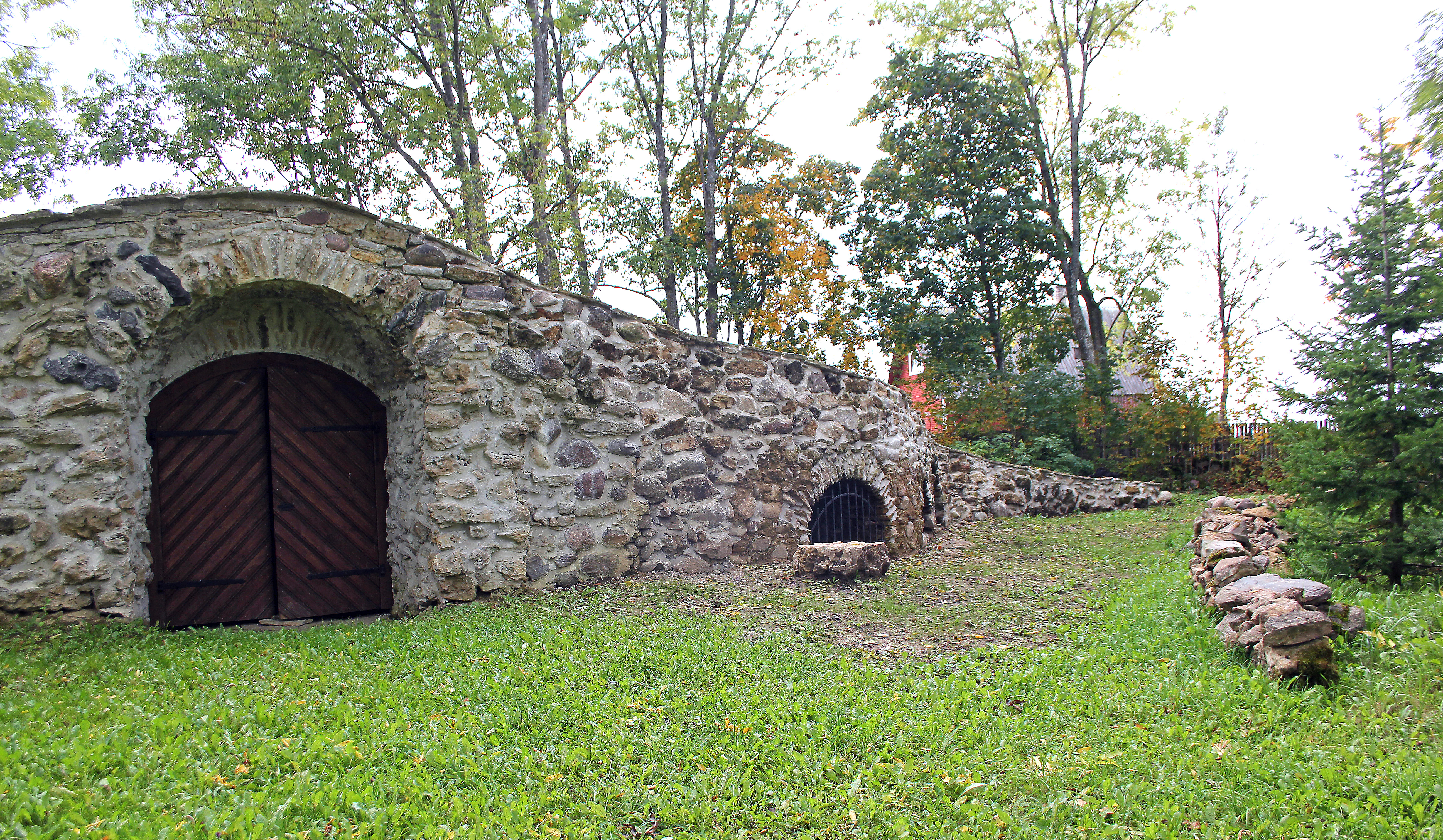 Võisiku mõisa kabel